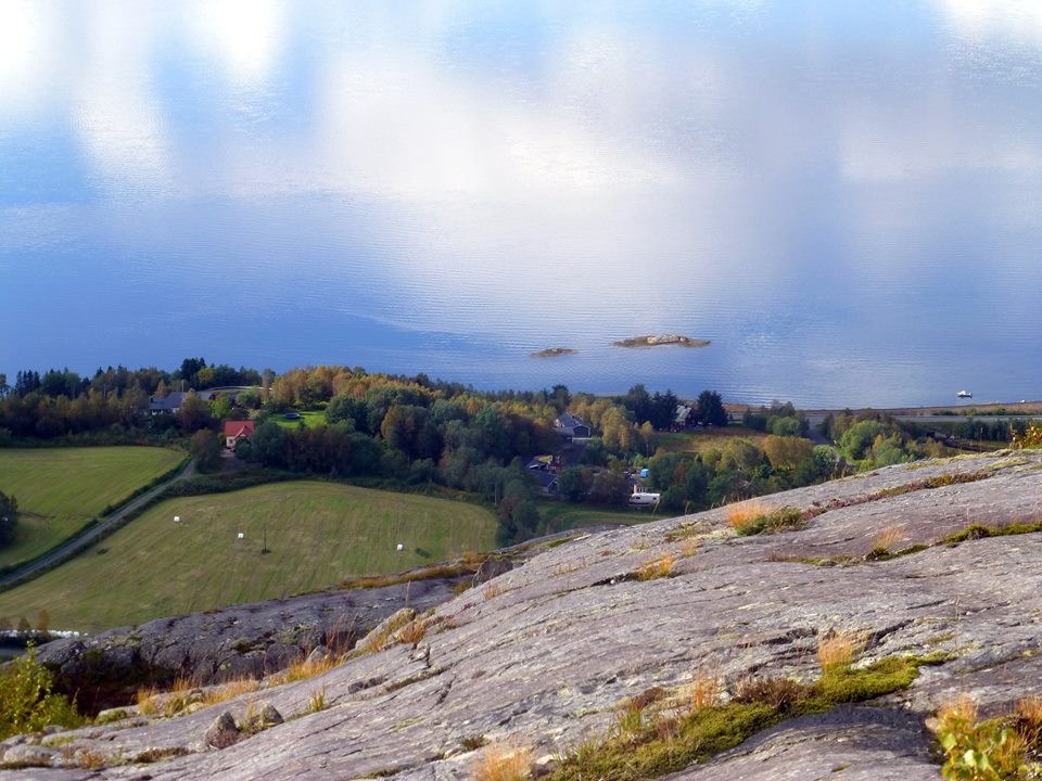 Panoramabilde over nordlige del av Lindset med Kobbskjæret.